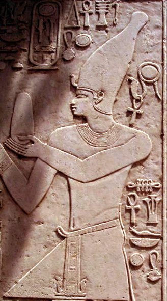 Sekhem-Rê Ouadj-khâou Sobekemsaf I